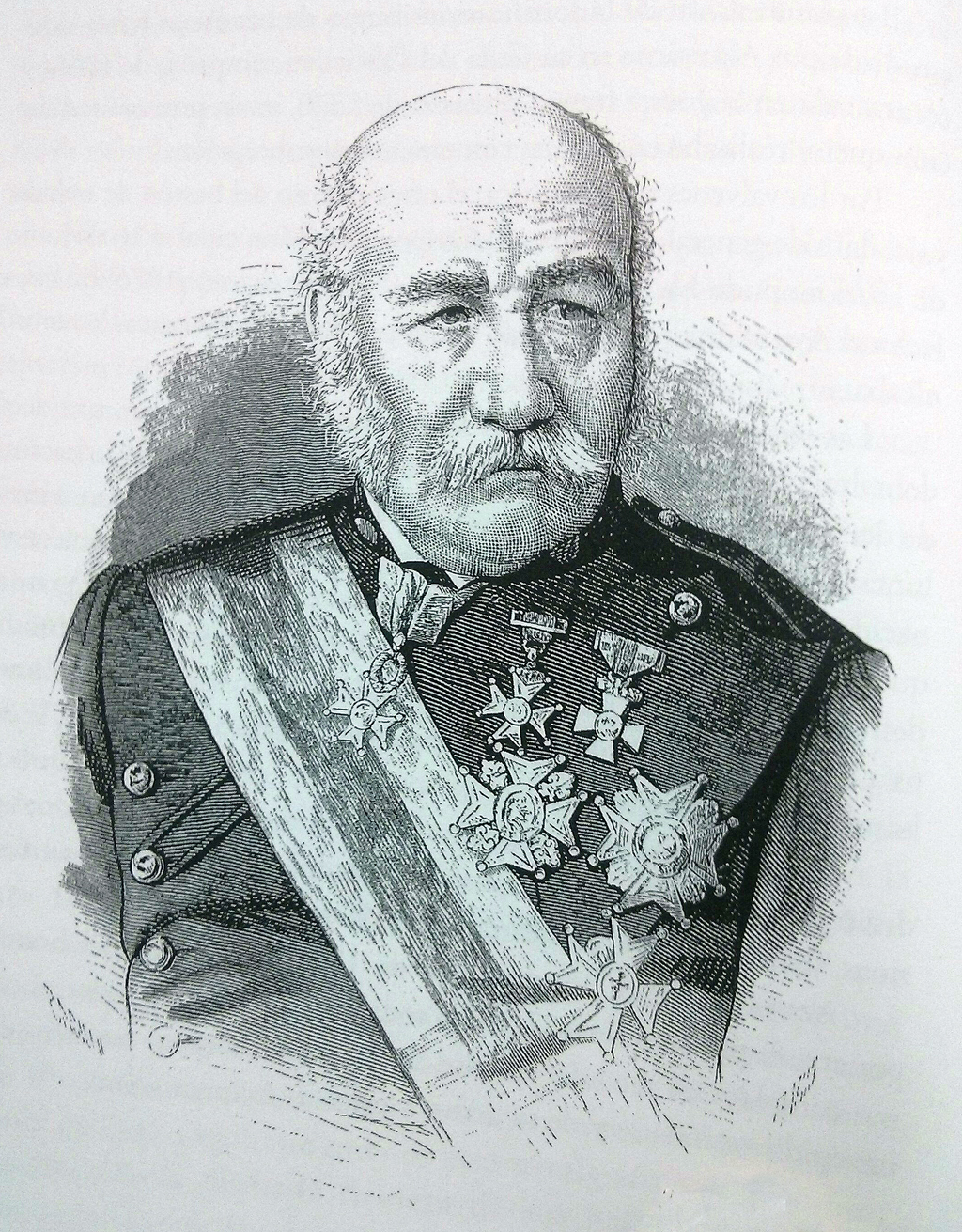 Retrato del general de división José Almirante y TorroellaBuenaventura Carbó y Aloy, publicado en El Moro Muza, 26 de junio de 1870, página 1